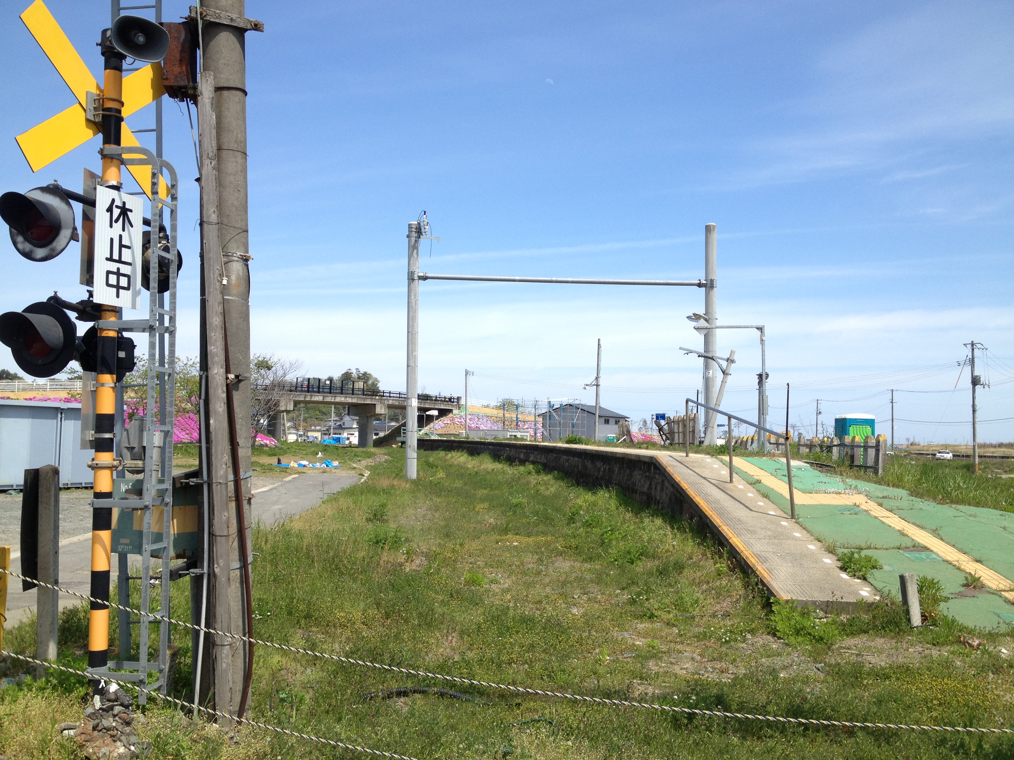 2013年5月。設備が撤去された仙石線東名駅。奥は宮城県道27号の跨線橋。